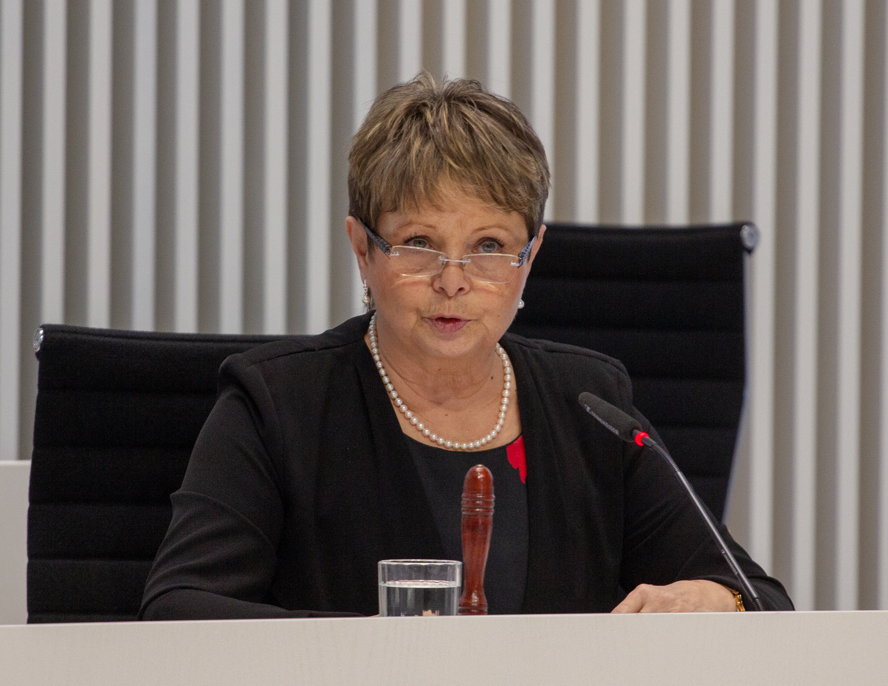 Mignon Schwenke im Plenum des Landtages Mecklenburg-Vorpommern im März 2019.